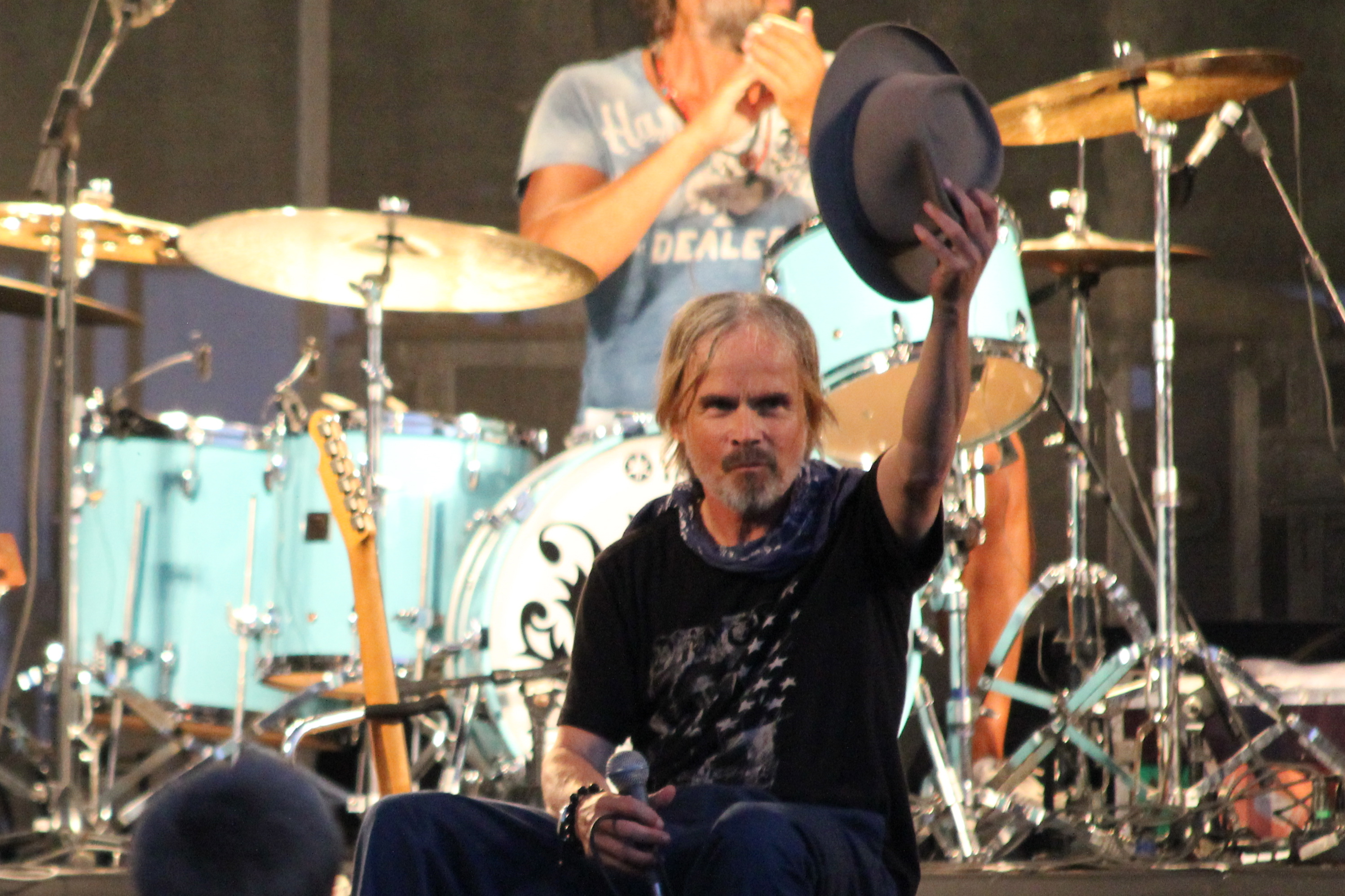 Danseorkestret i Kongens have i Odense 26. juli 2012